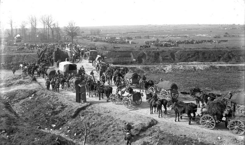 I. Weltkrieg 1914-1918 Vormarschstrasse bei Etricourt (24.3.18)